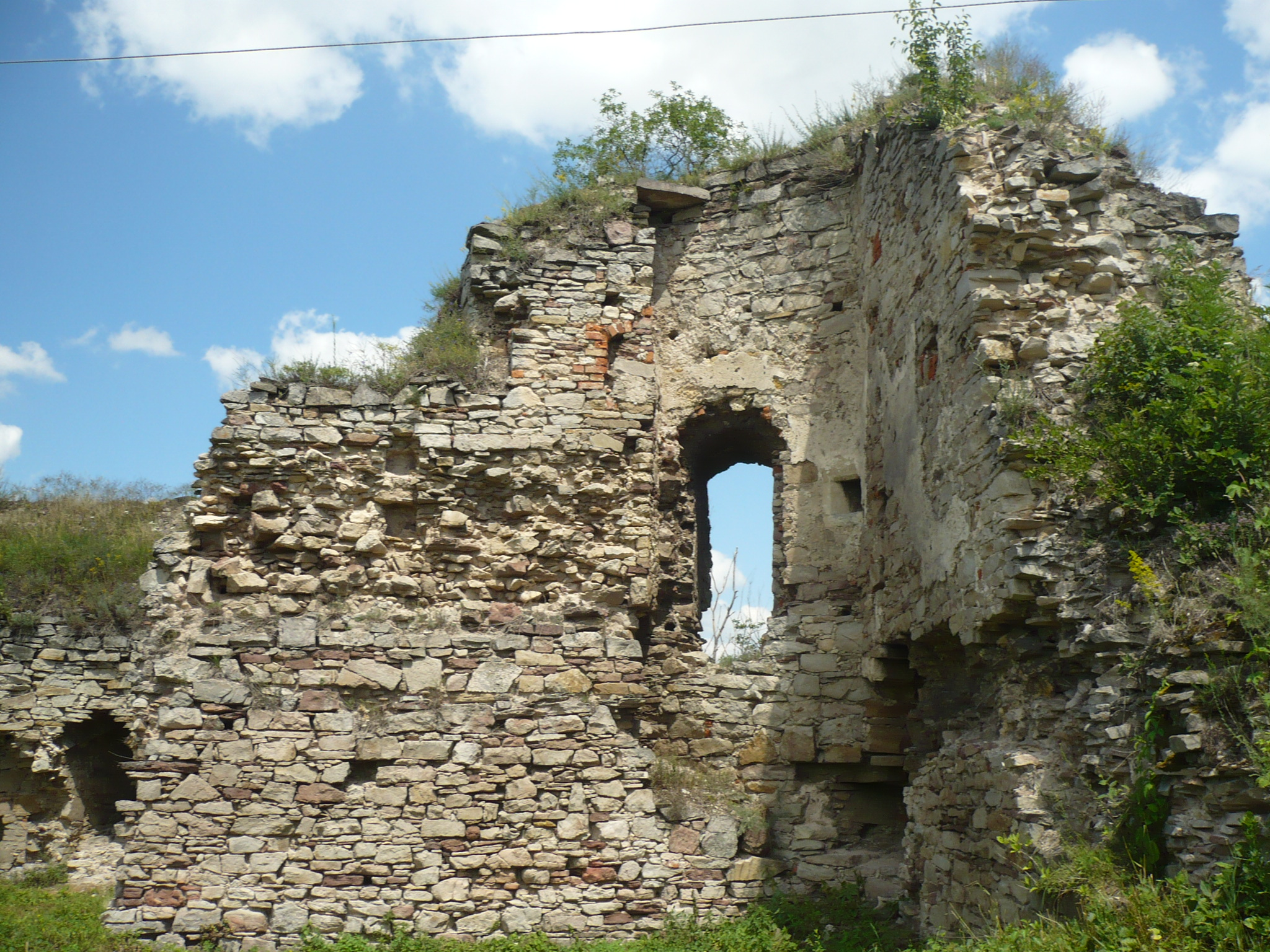 Jazłowiec. Zamek